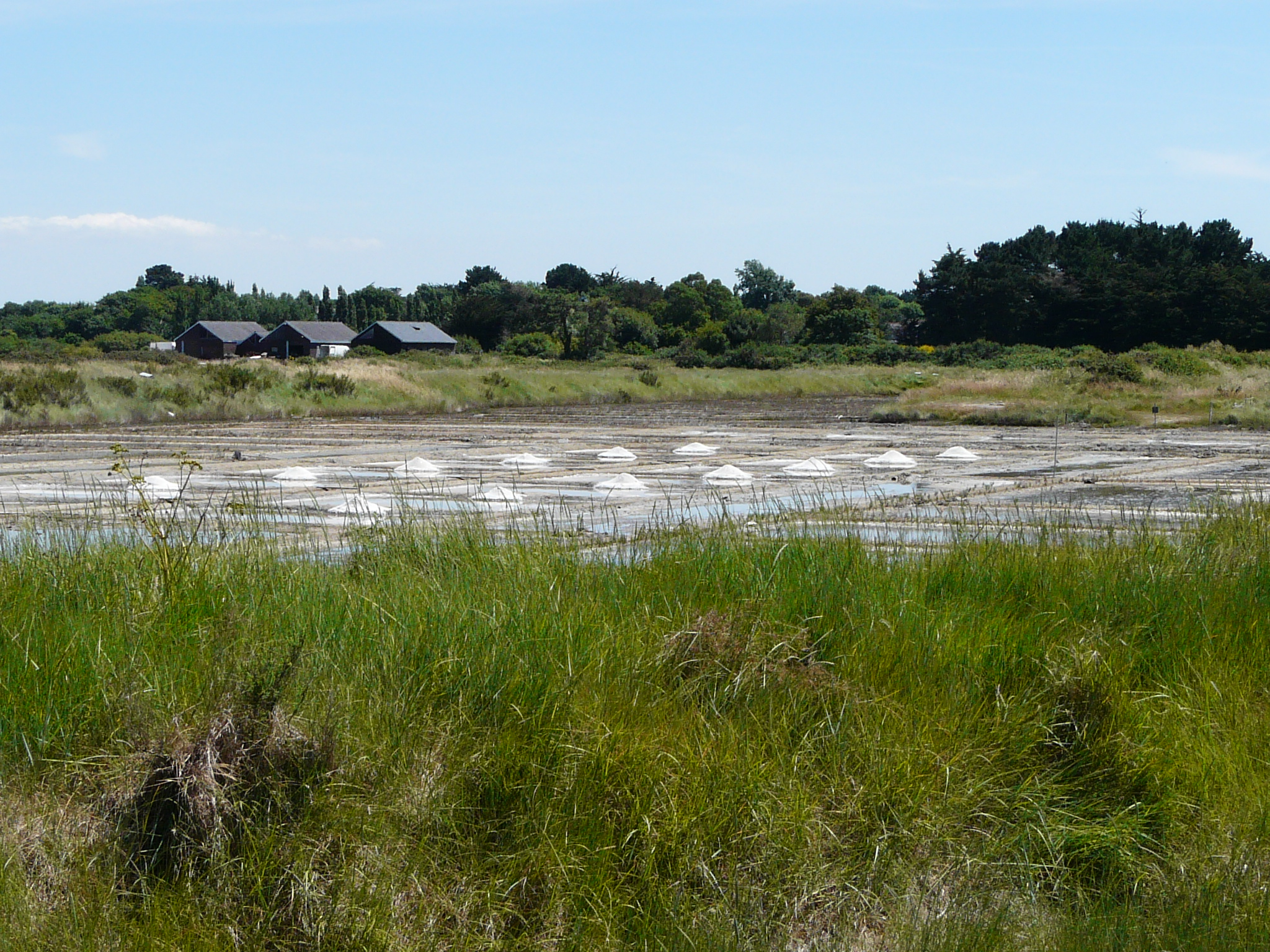 Exploitation de sel dans le marais de Lasné (Saint-Armel, Morbihan)